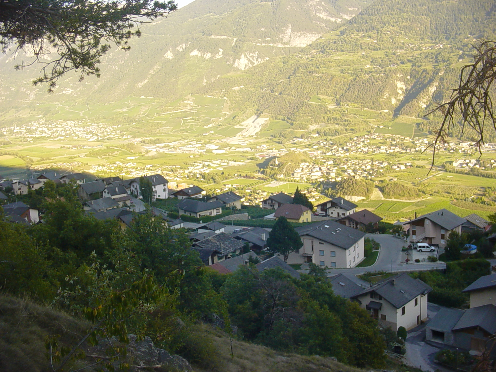 Chelin vu depuis la forêt.